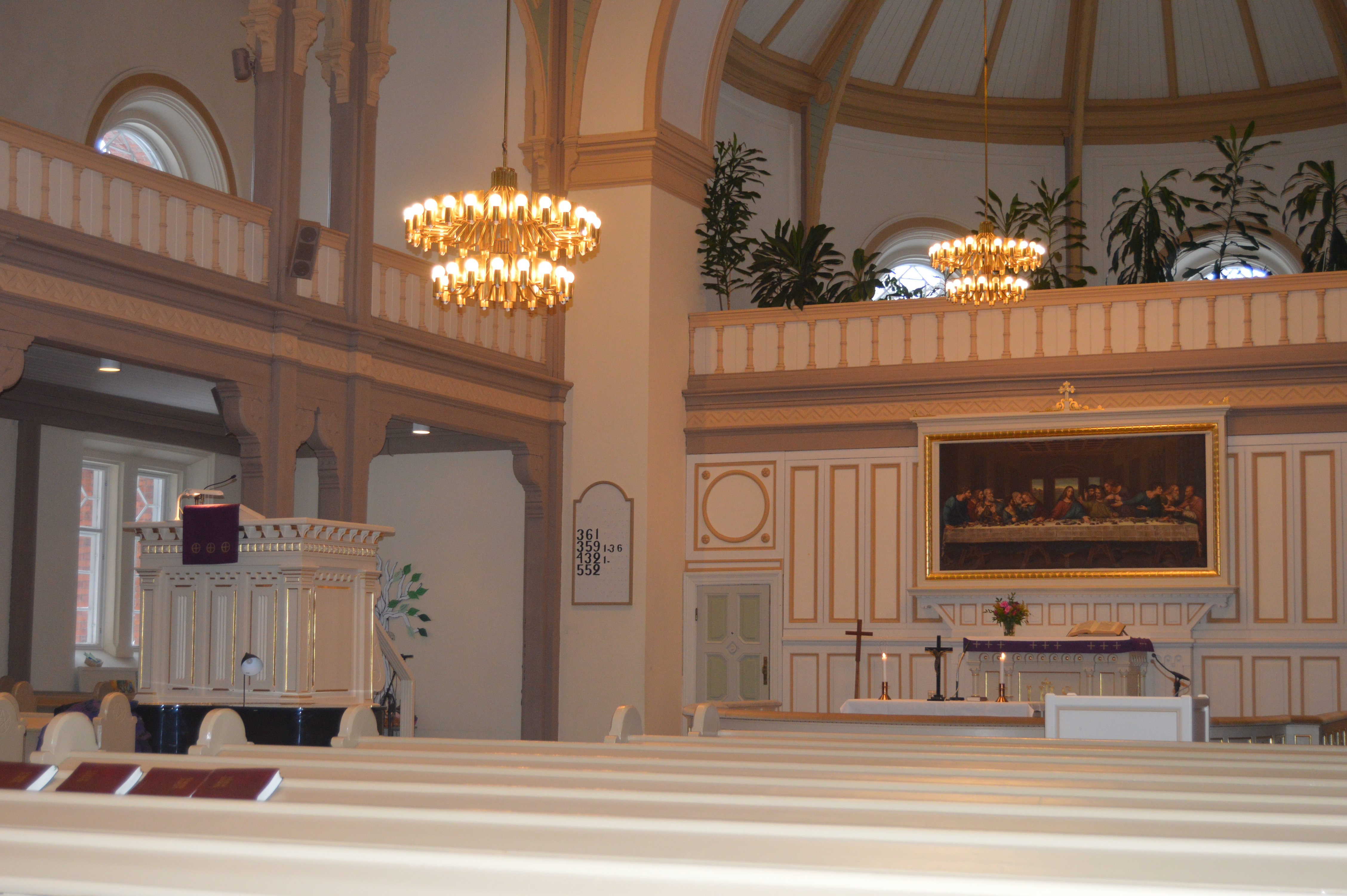 Kiteen kirkon alttari ja saarnastuoli